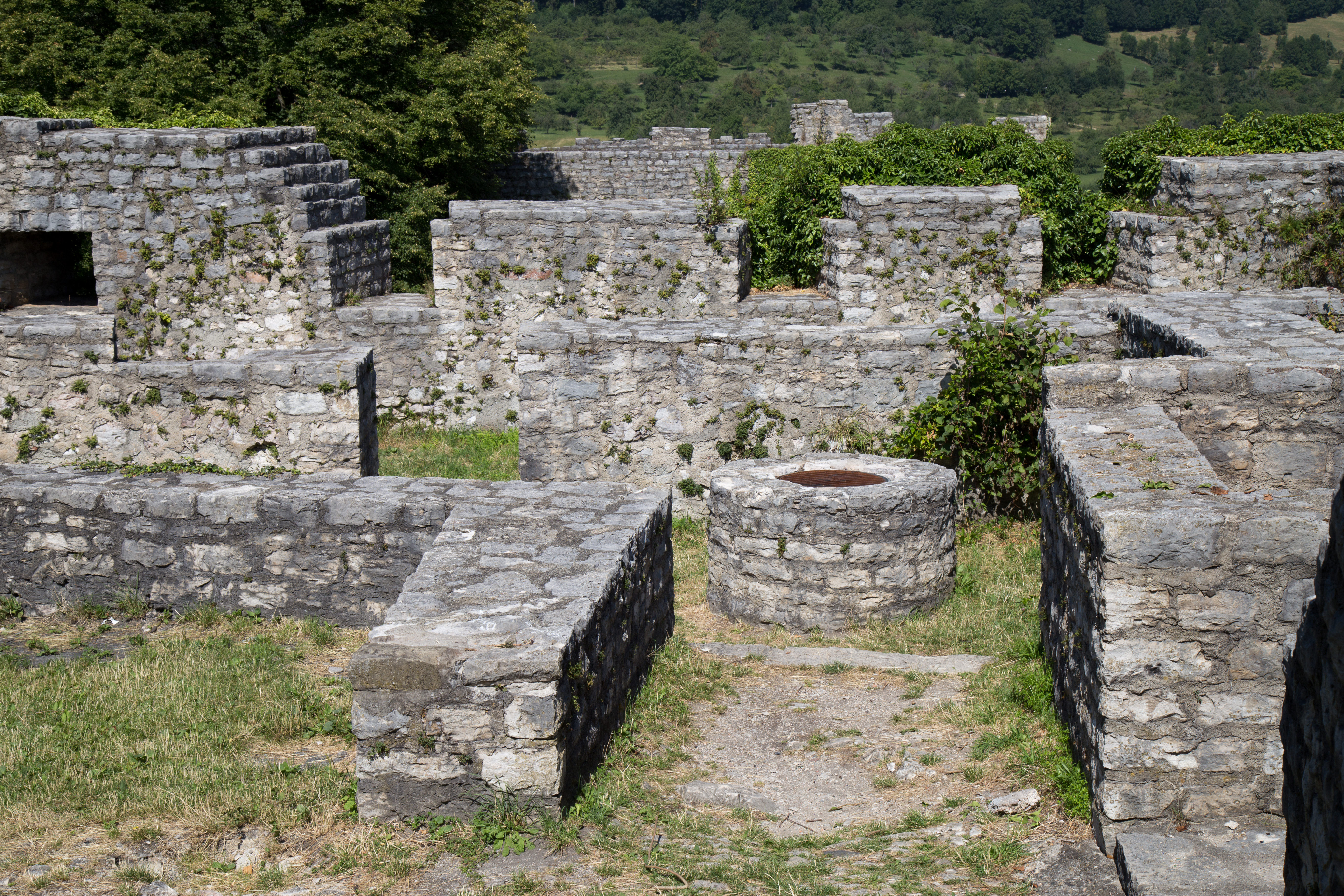 Ruine Sulzburg bei Unterlenningen im Lautertal